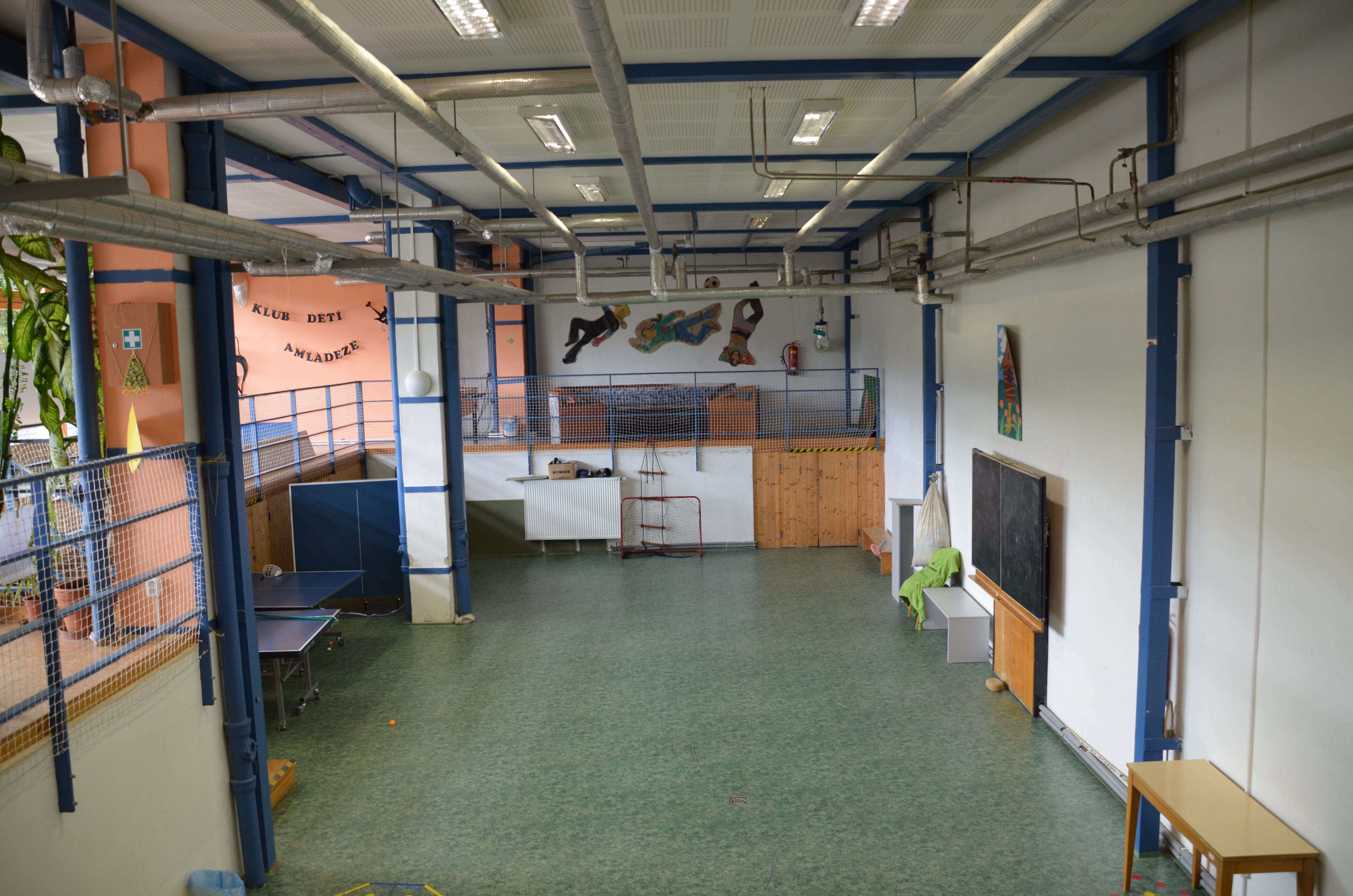 Interiér Městského klubu mládeže v Adamově